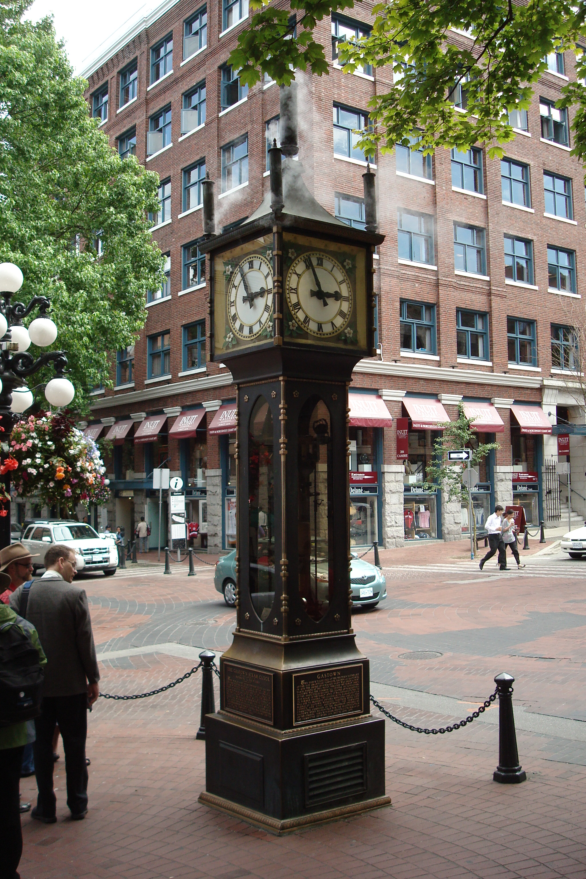 Vue de la Steam Clock à Vancouver